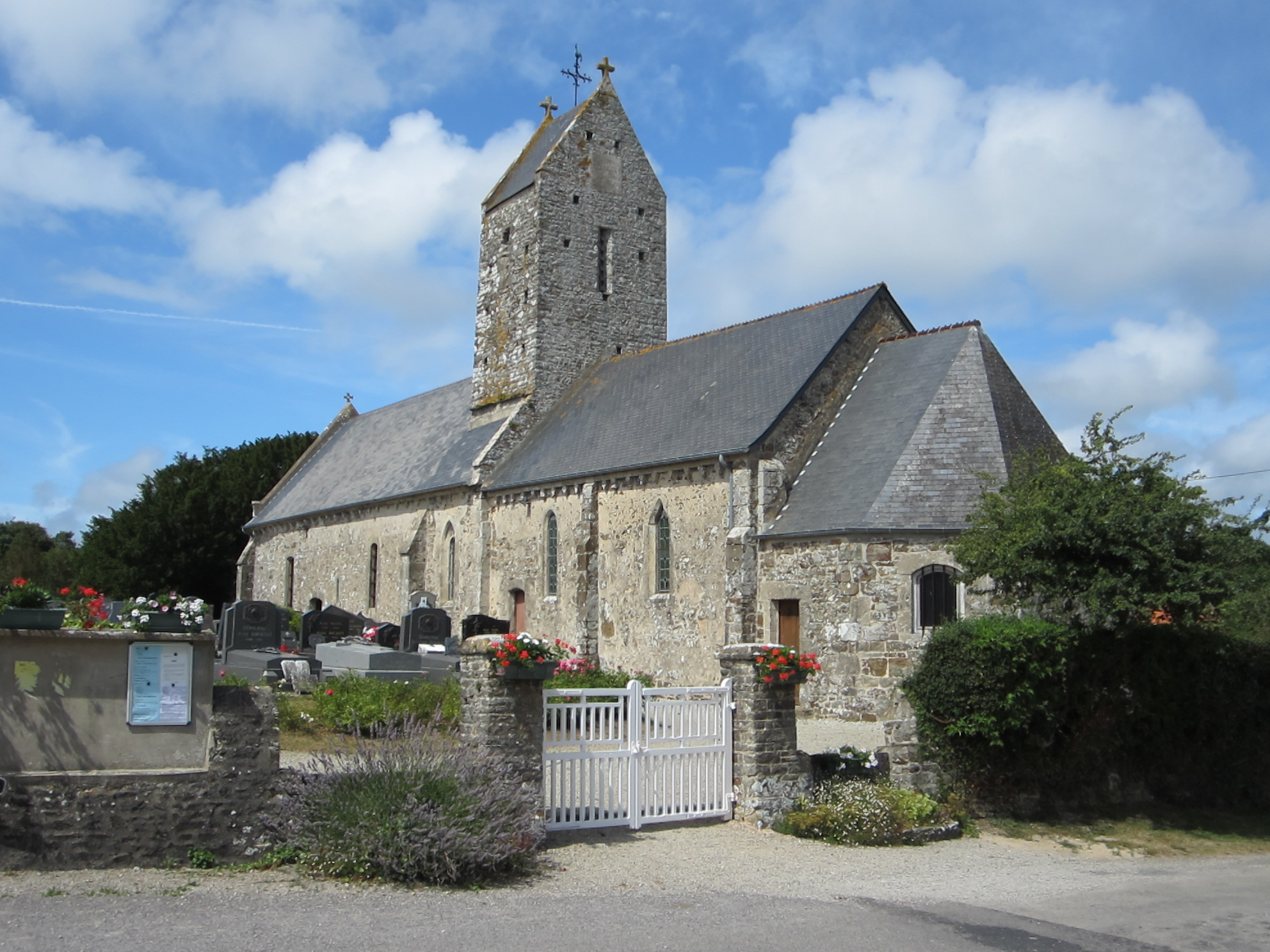 église Saint-Martin du Mesnil